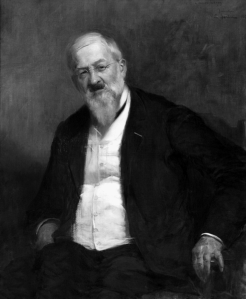 Filolog bearnista Vastin Lespin